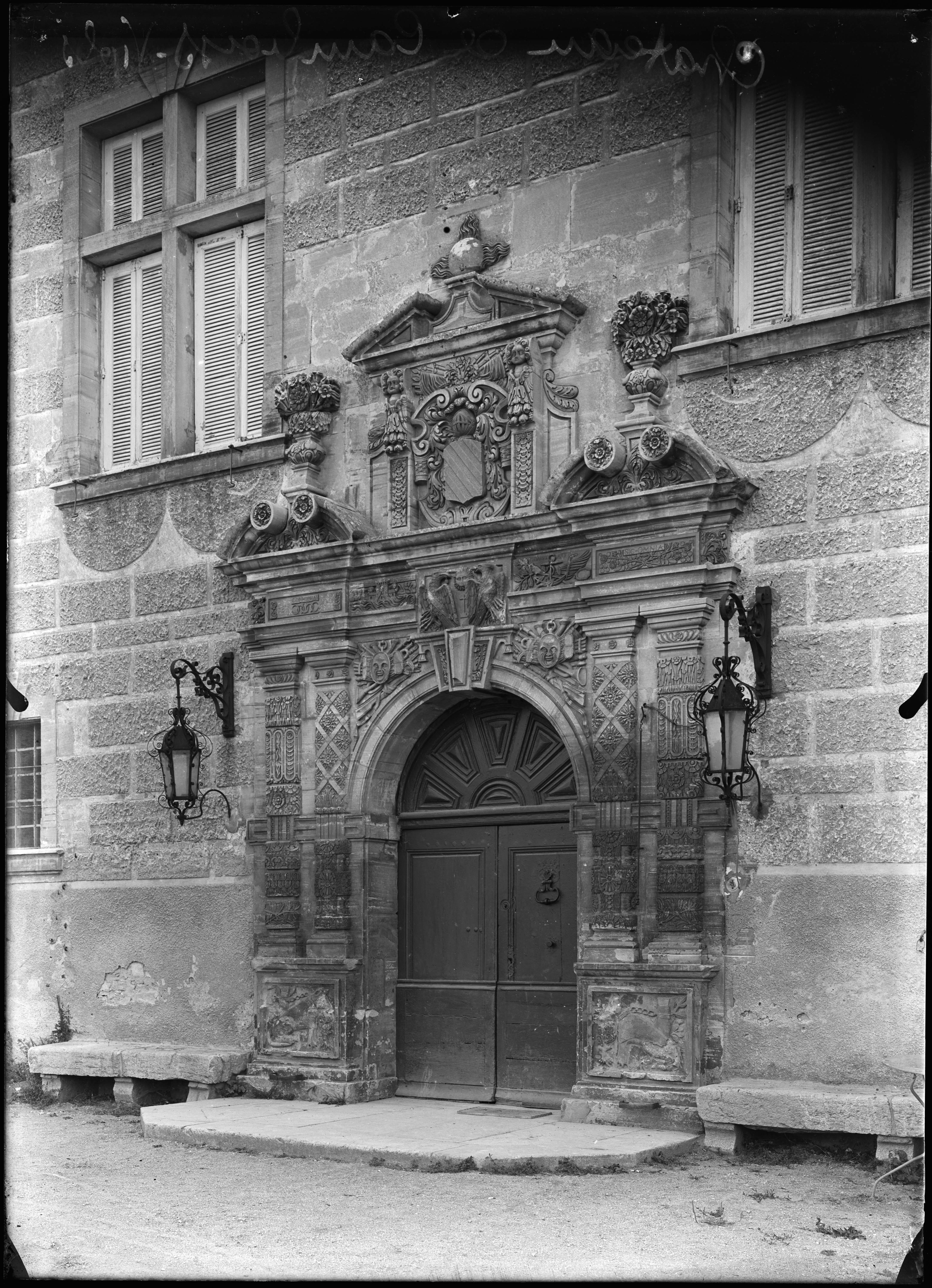 Viols-en-Laval. - Portail du château de Cambous : photographie.